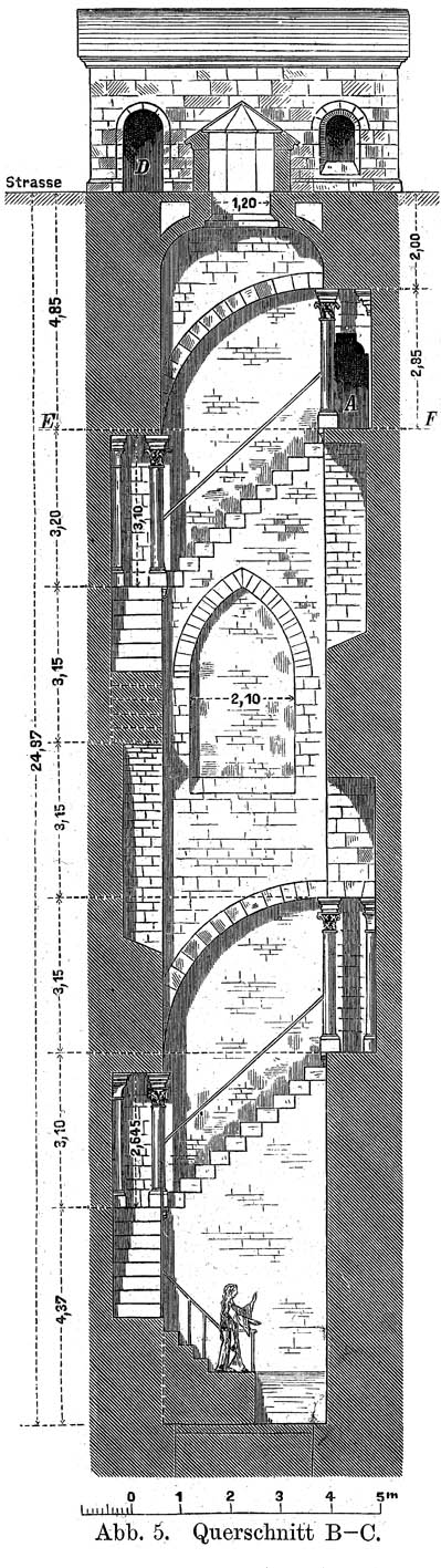 Schnittzeichnung Judenbad Friedberg